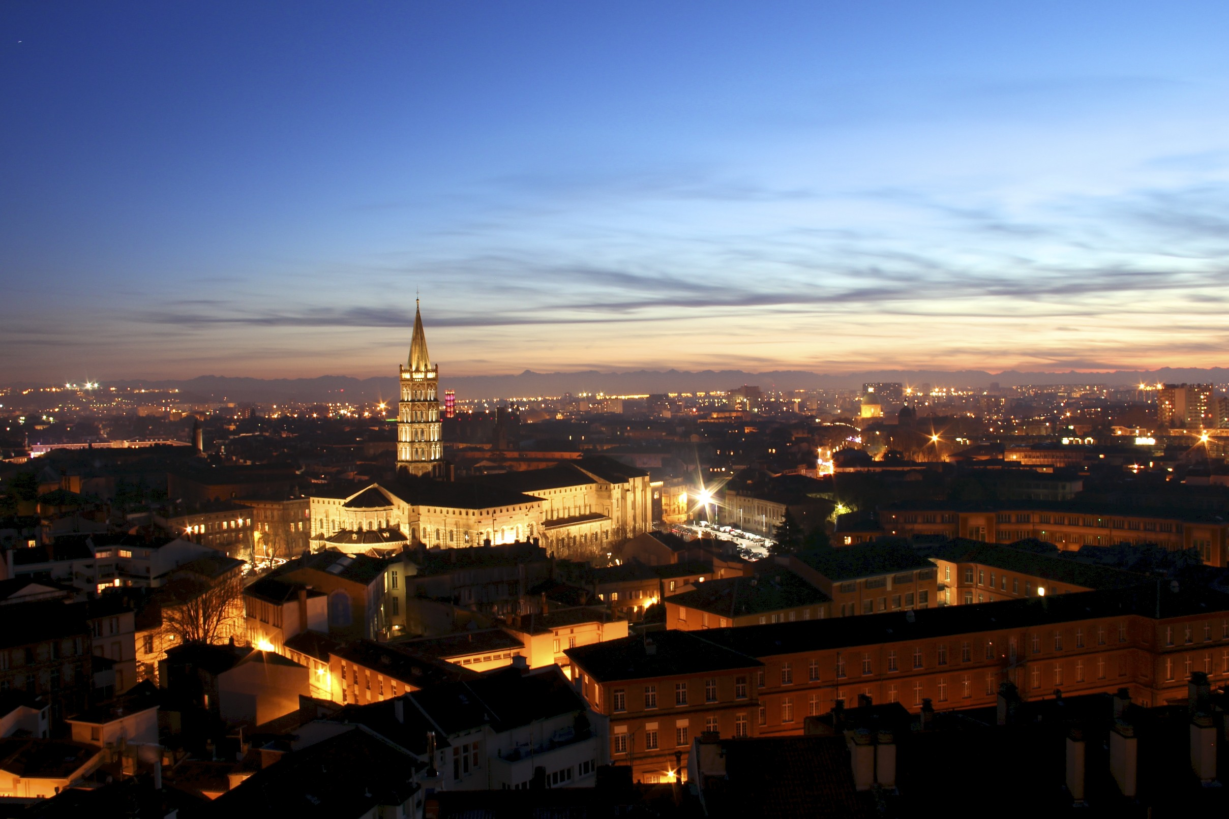 Basilique Saint-Sernin à Toulouse